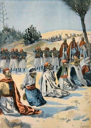 Execution d'espions en Algerie